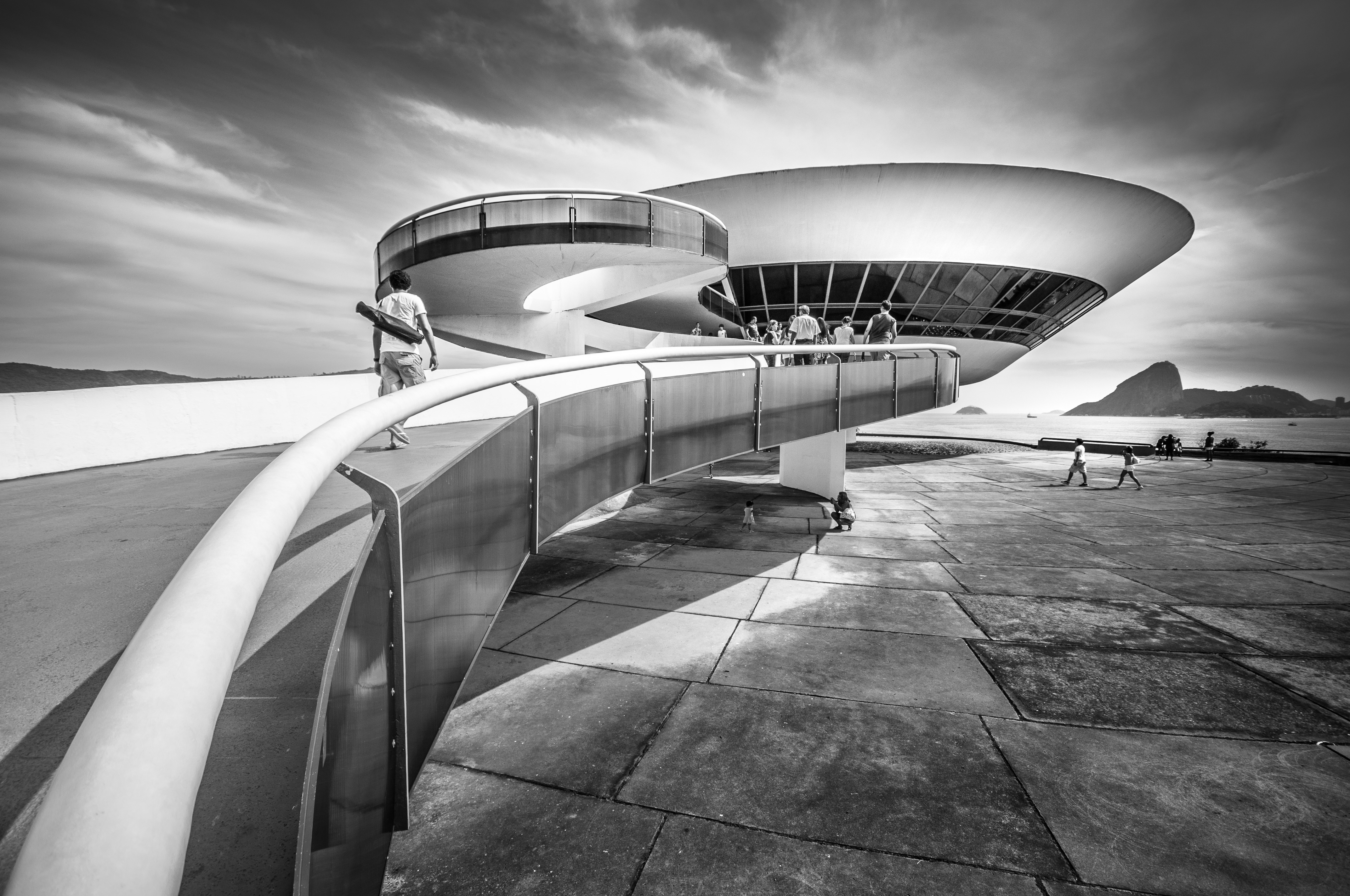 Cultural property Niterói Contemporary Art Museum, Niterói, Rio de Janeiro, Brazil Q1573239, VIAF ID: 138115194, Library of Congress authority ID: n98910632, P727: iPatrimônio ID: niteroi-museu-de-arte-contemporanea-mac, Itaú Cultural ID: instituicao109820/museu-de-arte-contemporanea-de-niteroi-mac-niteroi